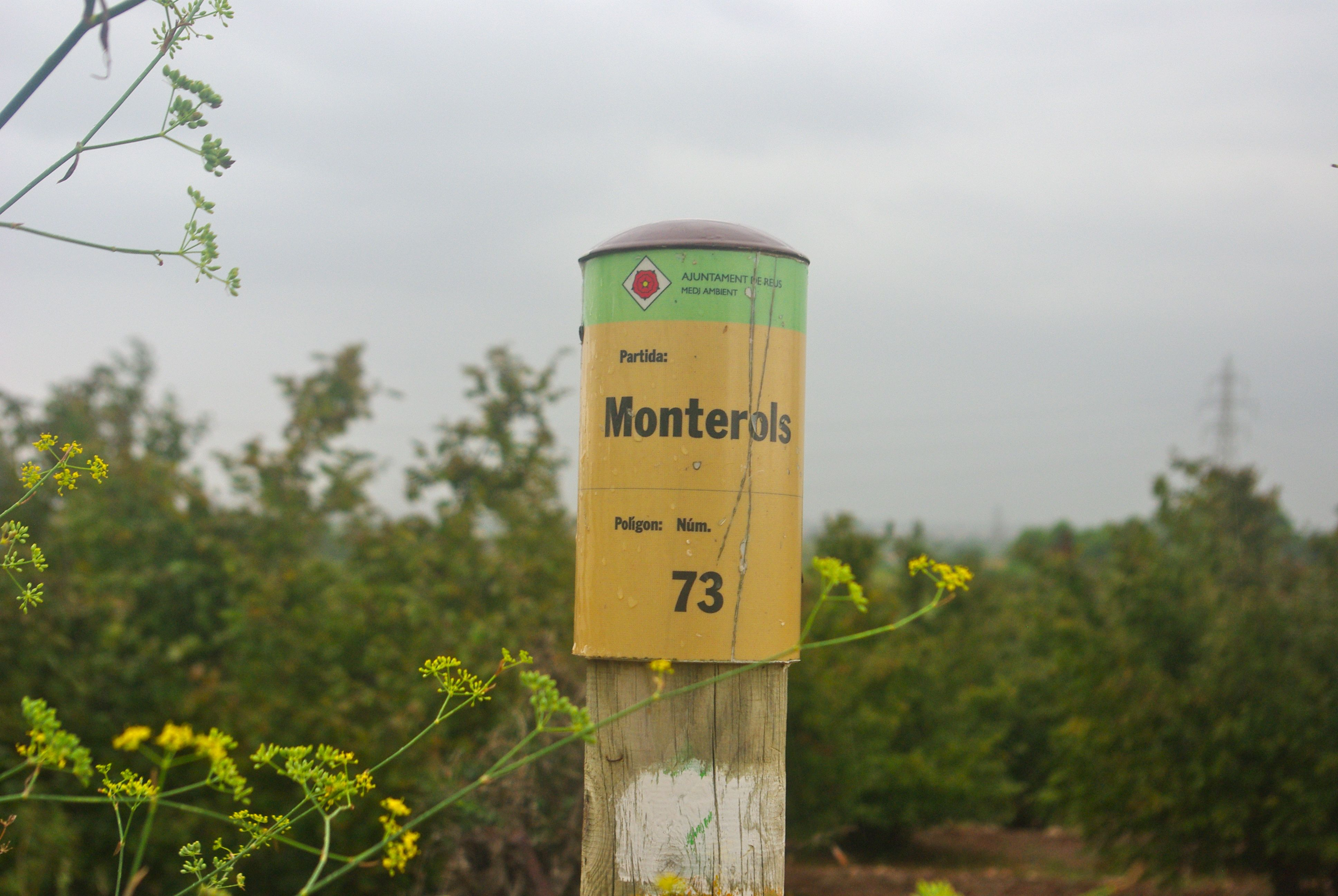 Fita de l'Ajuntament a la partida de Monterols, a Reus